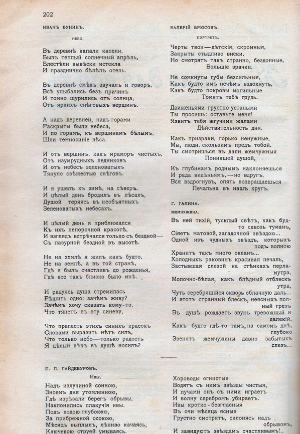 Стихотворения Галины Галиной, Валерия Брюсова, Ивана Бунина и Павла Гайдебурова в "Журнале для всех" в 1905 году